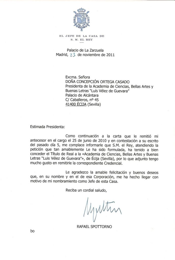 Carta del Jefe de la Casa Real de S.M. el Rey informando sobre la concesión del título de "Real" a la Academia de Ciencias, Bellas Artes y Buenas Letras "Luis Vélez de Guevara"